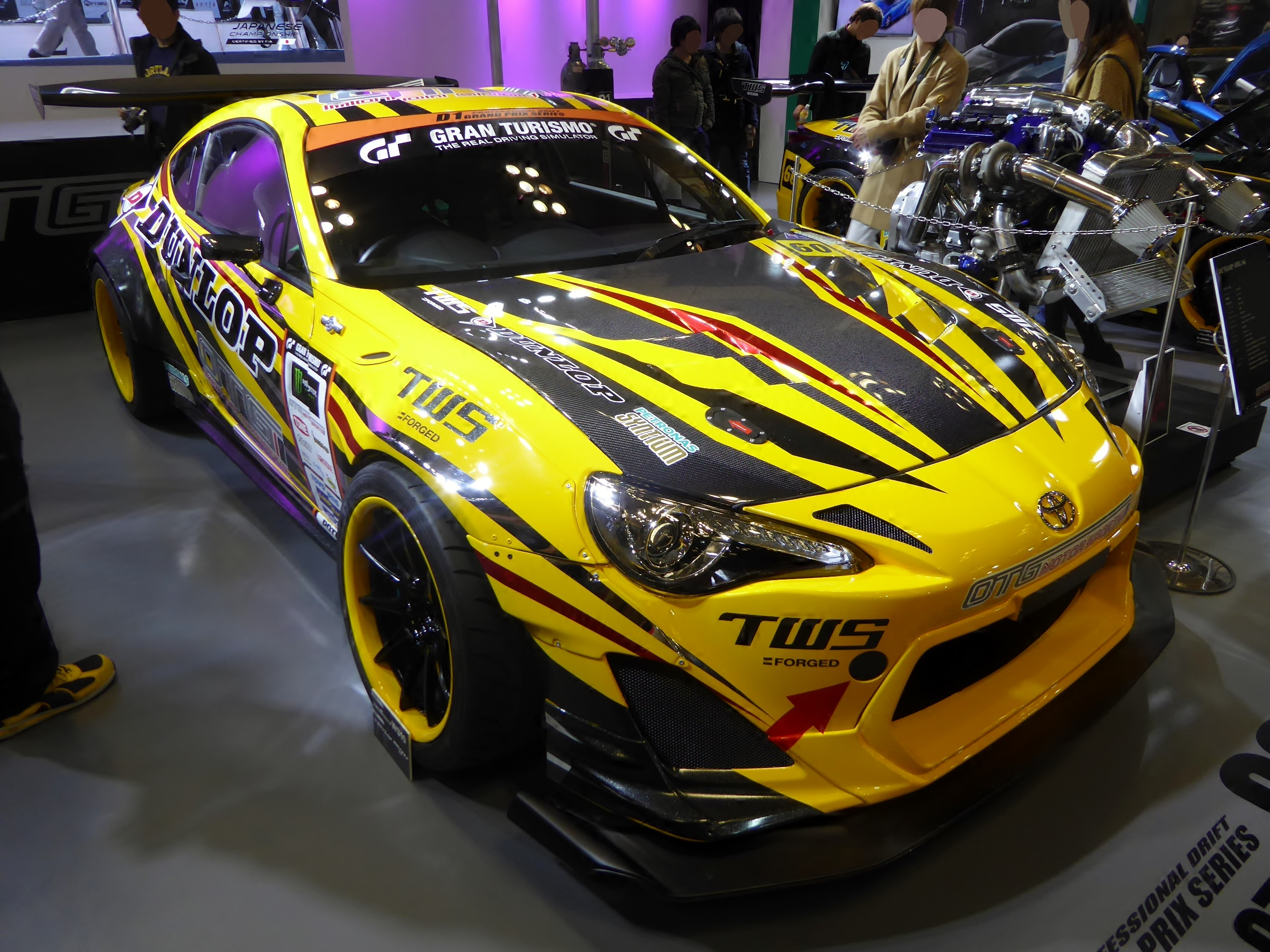 大阪オートメッセ2016において60号車DUNLOP OTG 86を撮影。